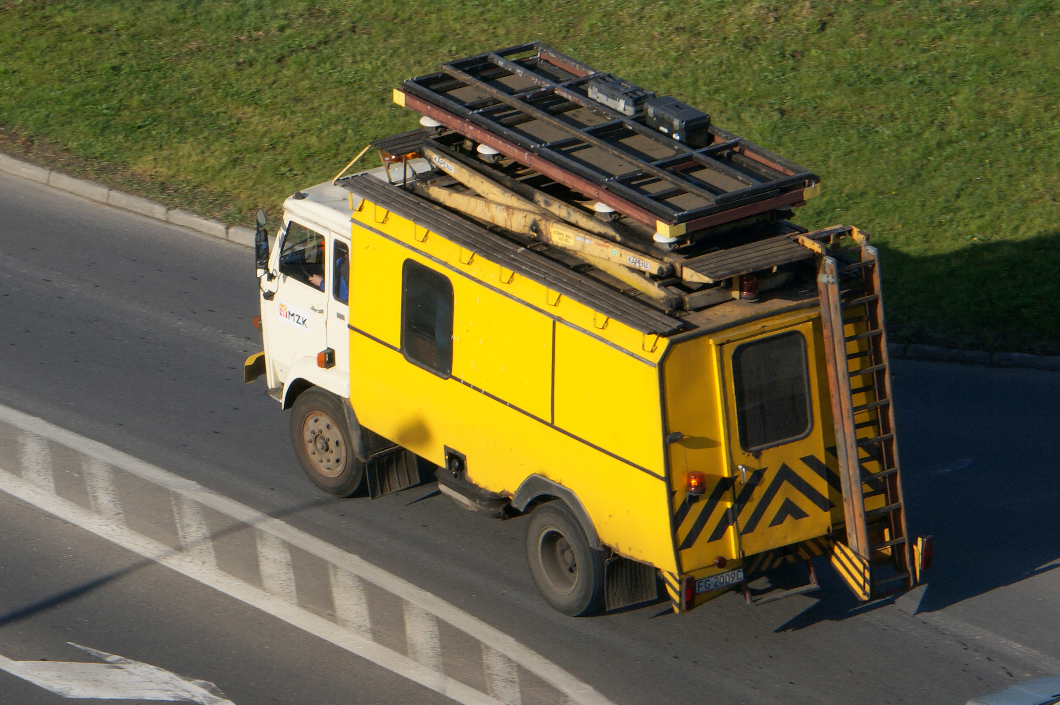 Star Z-28 SWN-11 ( #196 ). Pojazd wieżowy pogotowia sieciowego gorzowskiego MZK. Zabudowa WUKO.